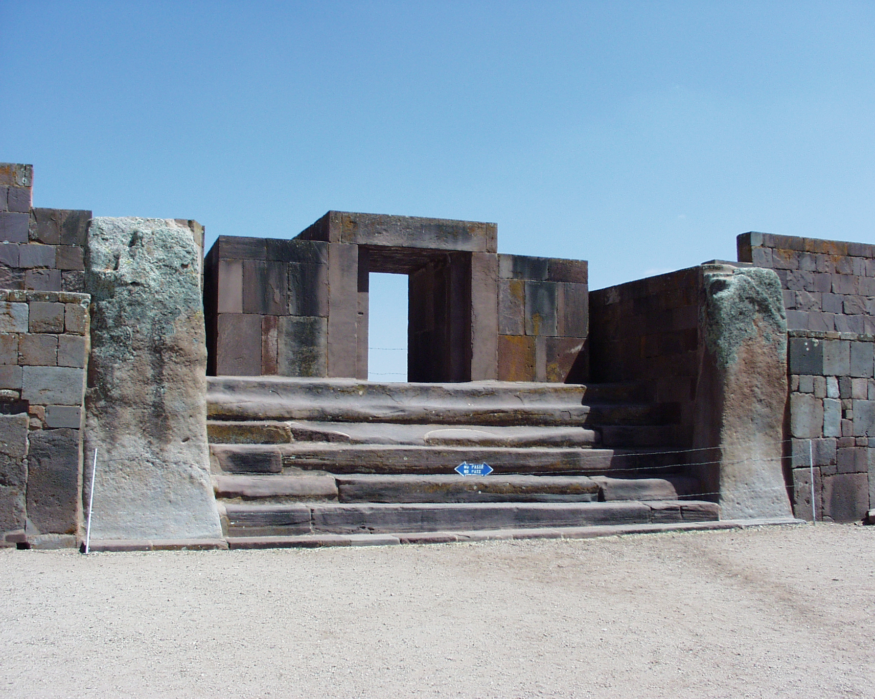 La escalinata y la Puerta de la Luna en el templo de Qalasasaya en Tiwanaku, La Paz-Bolivia.